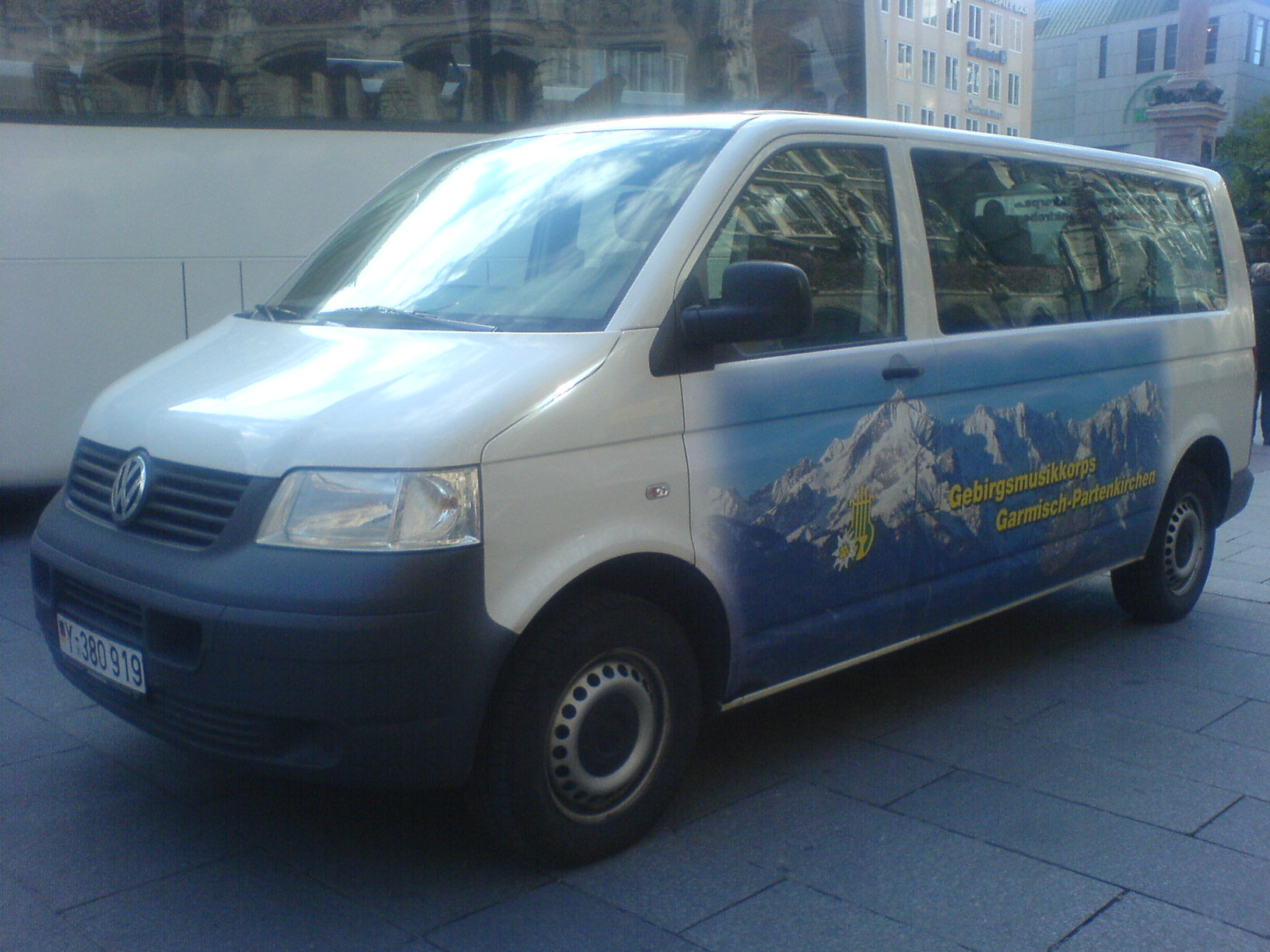 Bundeswehr - Kleinbus des Gebirgsmusikkorps Garmisch-Partenkirchen (Y-380 919)